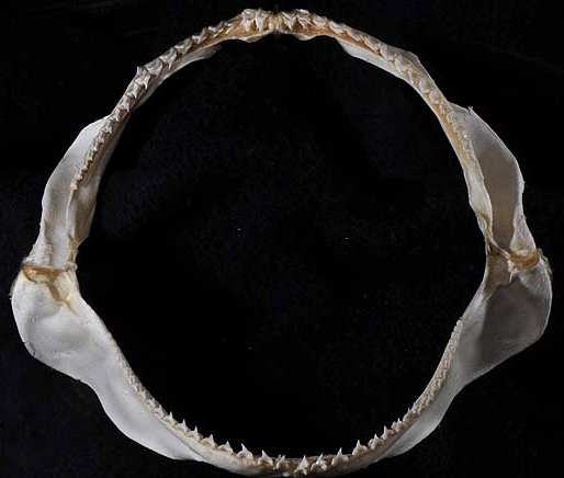 Alopias pelagicus